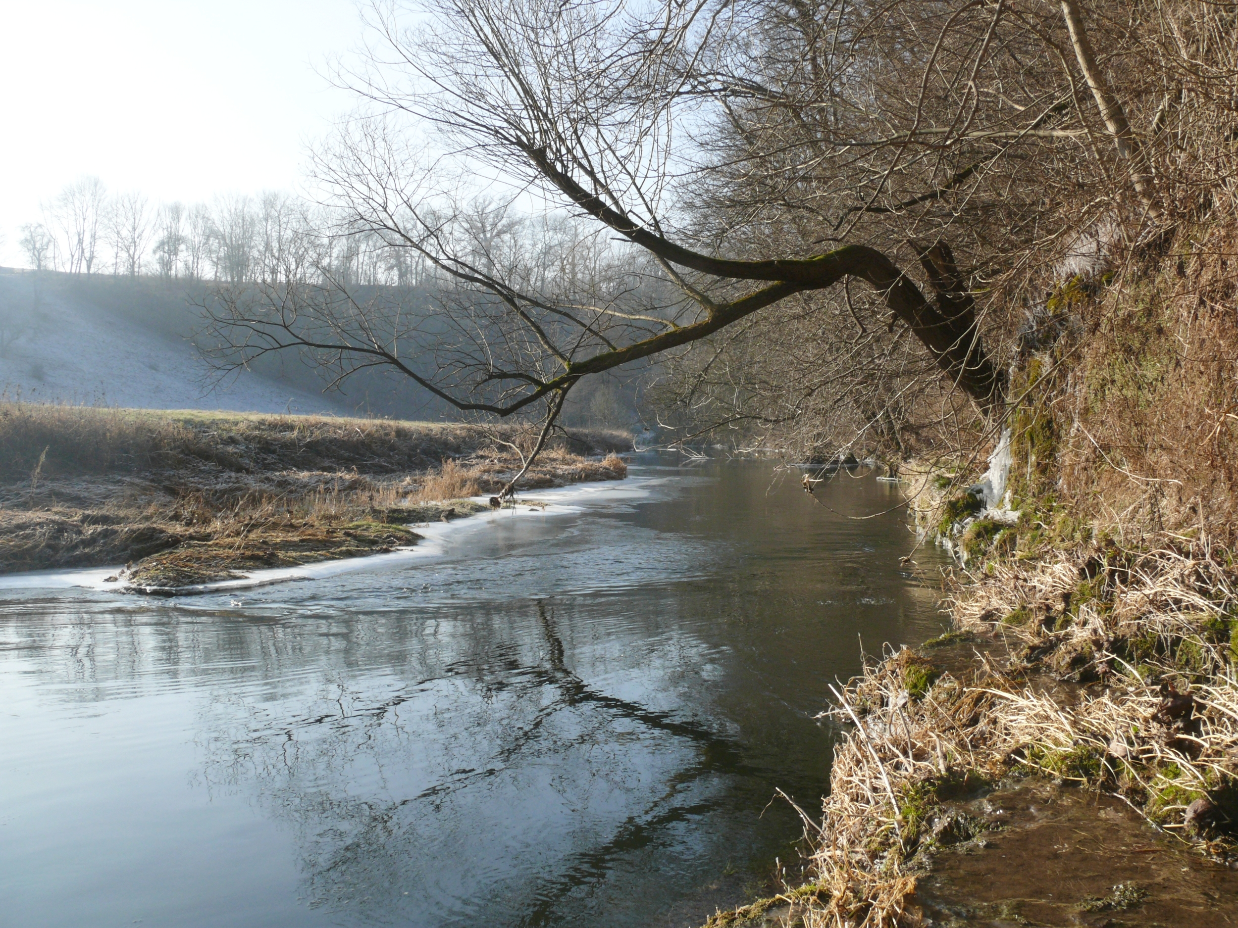 Bühler bei Vellberg-Rappolden